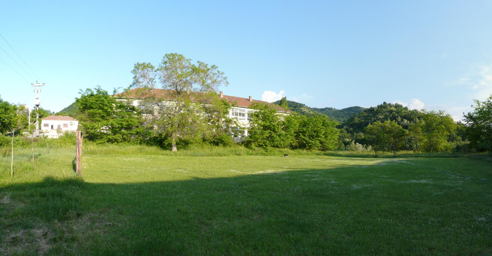 Игралиштето во Горна Бошава и училиштето ,,Илинден".